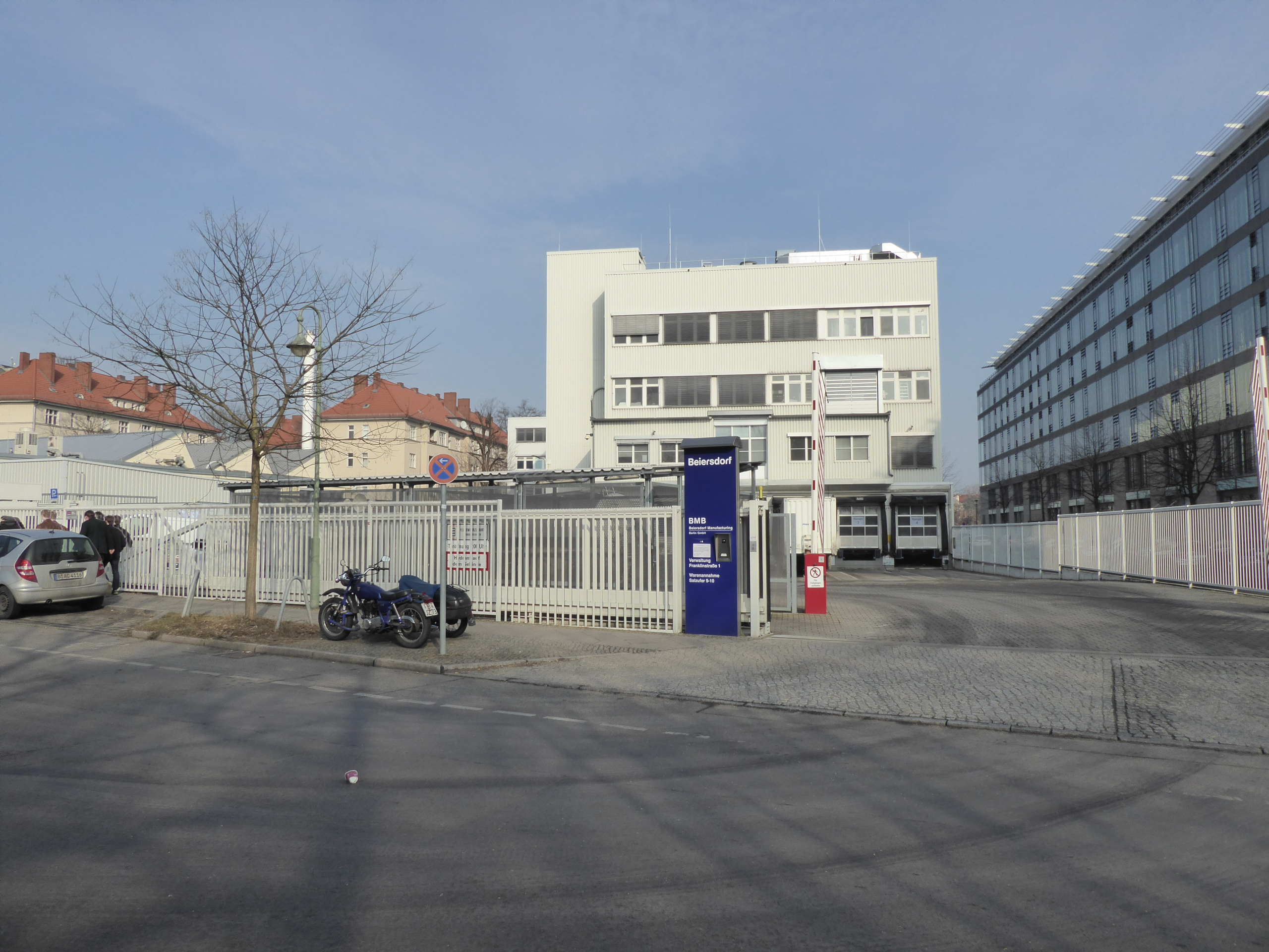 Charlottenburg Salzufer 9-10 Zufahrt Beiersdorf